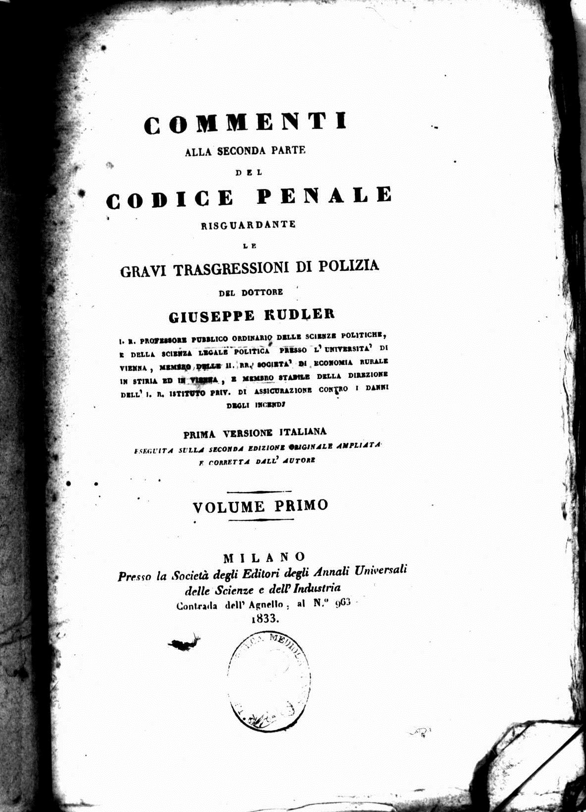 Frontespizio